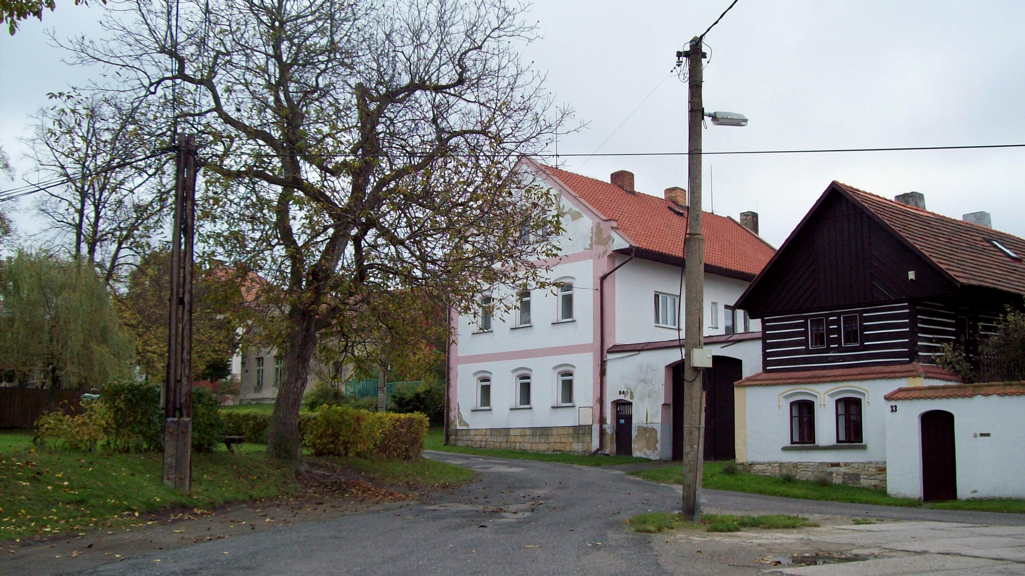 Náves, Střemy, okres Mělník, náves, čp. 33 a 34